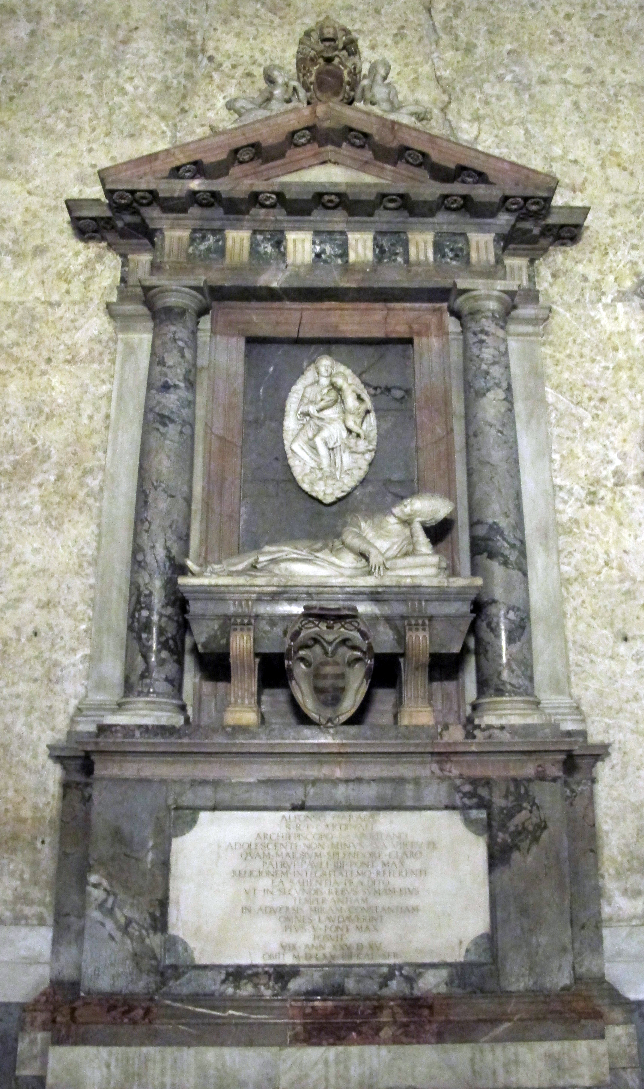 Duomo di Napoli, monumento funebre di Alfonso Carafa (XVI secolo)